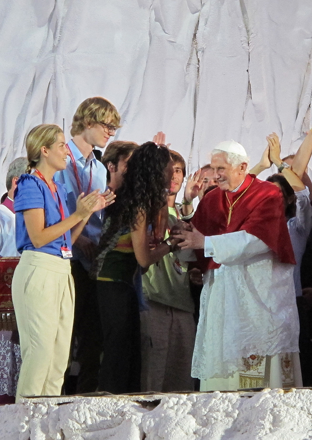 El Papa saluda a jóvenes de distintas nacionalidades a su llegada a la vigilia de Cuatro Vientos el 20/08/2011